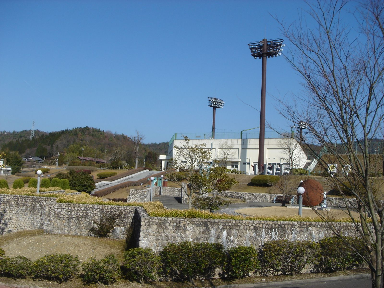 Toki City General Park（土岐市総合公園）,Toki,Gifu,Japan(岐阜県土岐市)で撮影。